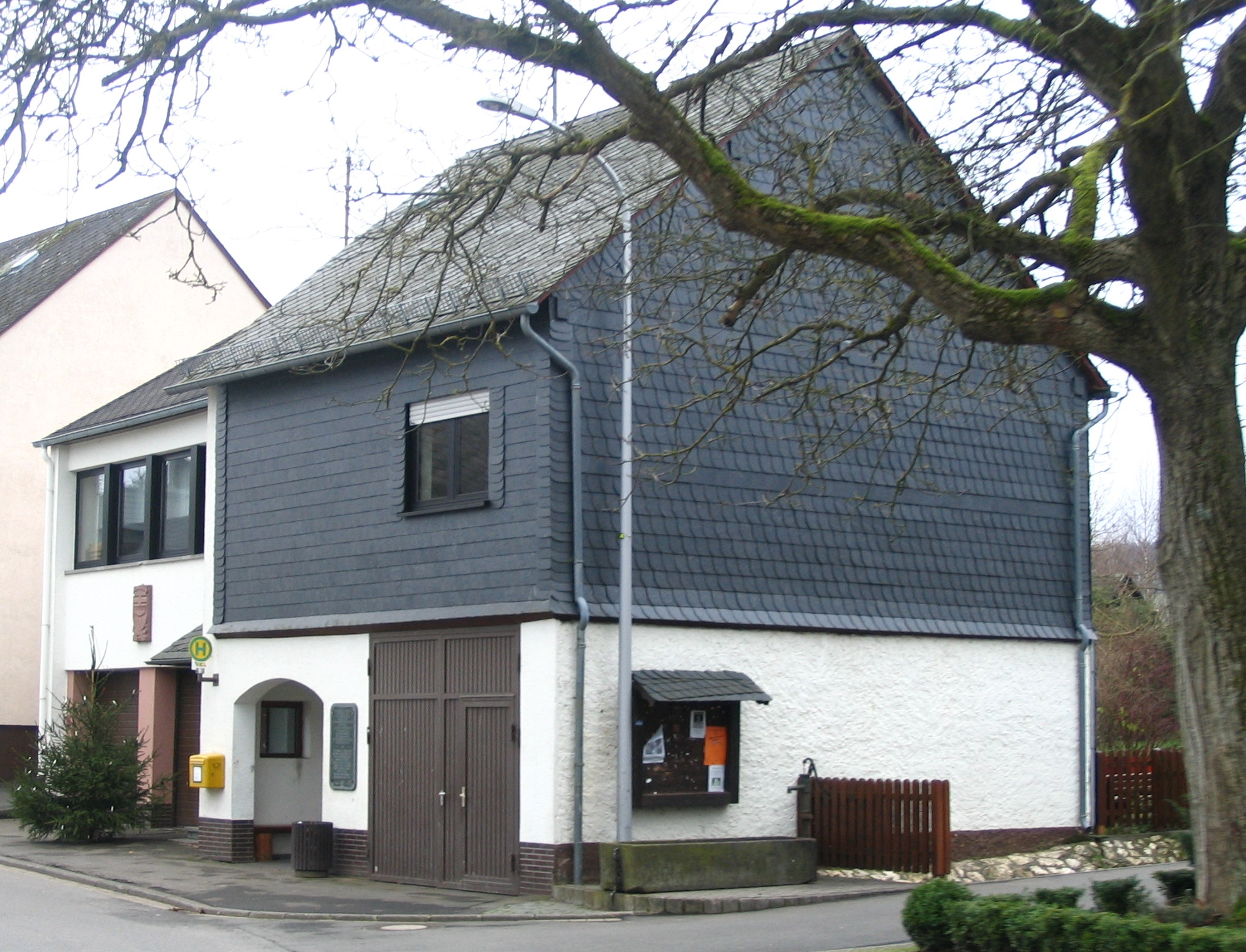 Bürgerhaus Hesweiler im Hunsrück